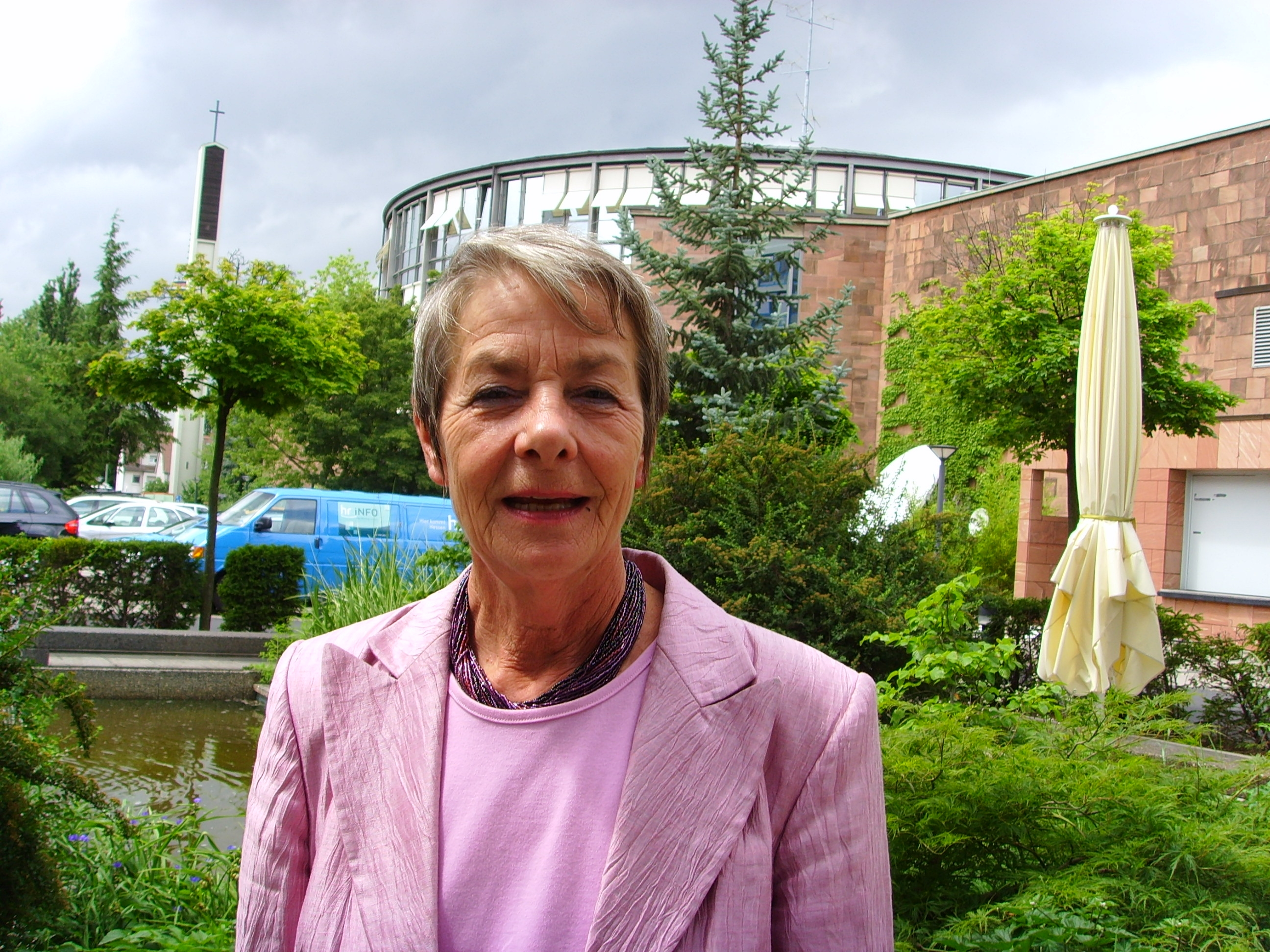 Ulrike Holler, Hoerfunkjournalistin